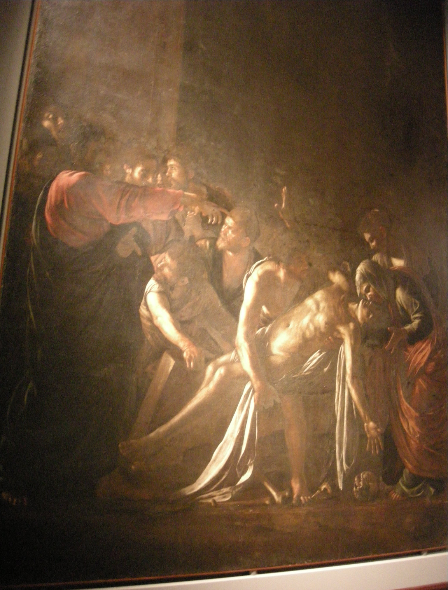 Museo regionale di messina, caravaggio, resurrezione di lazzaro 2